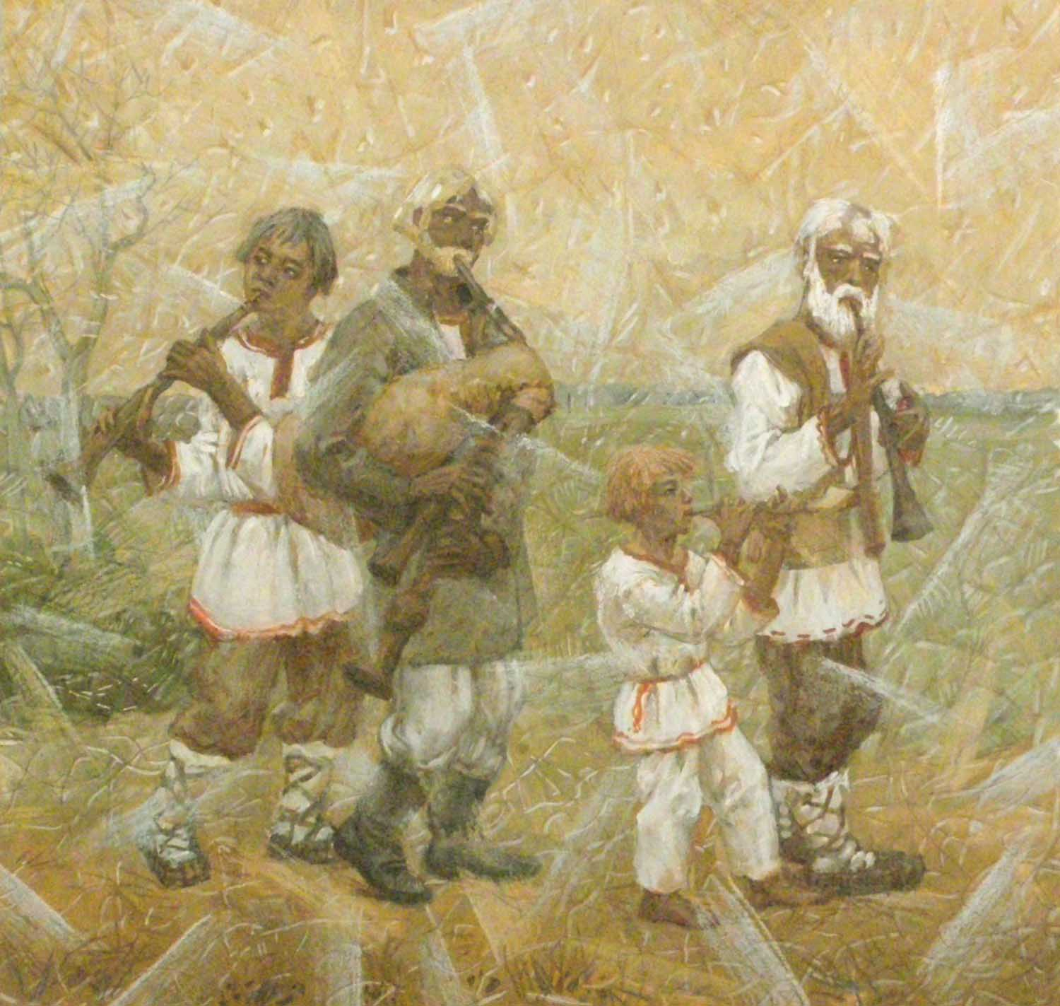 Группа музыкантов - исполнителей на древнерусских духовых инструментах